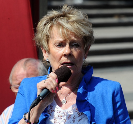 Towa Carson, Lunchkonsert, Kungsträdgården 24 juli 2013.